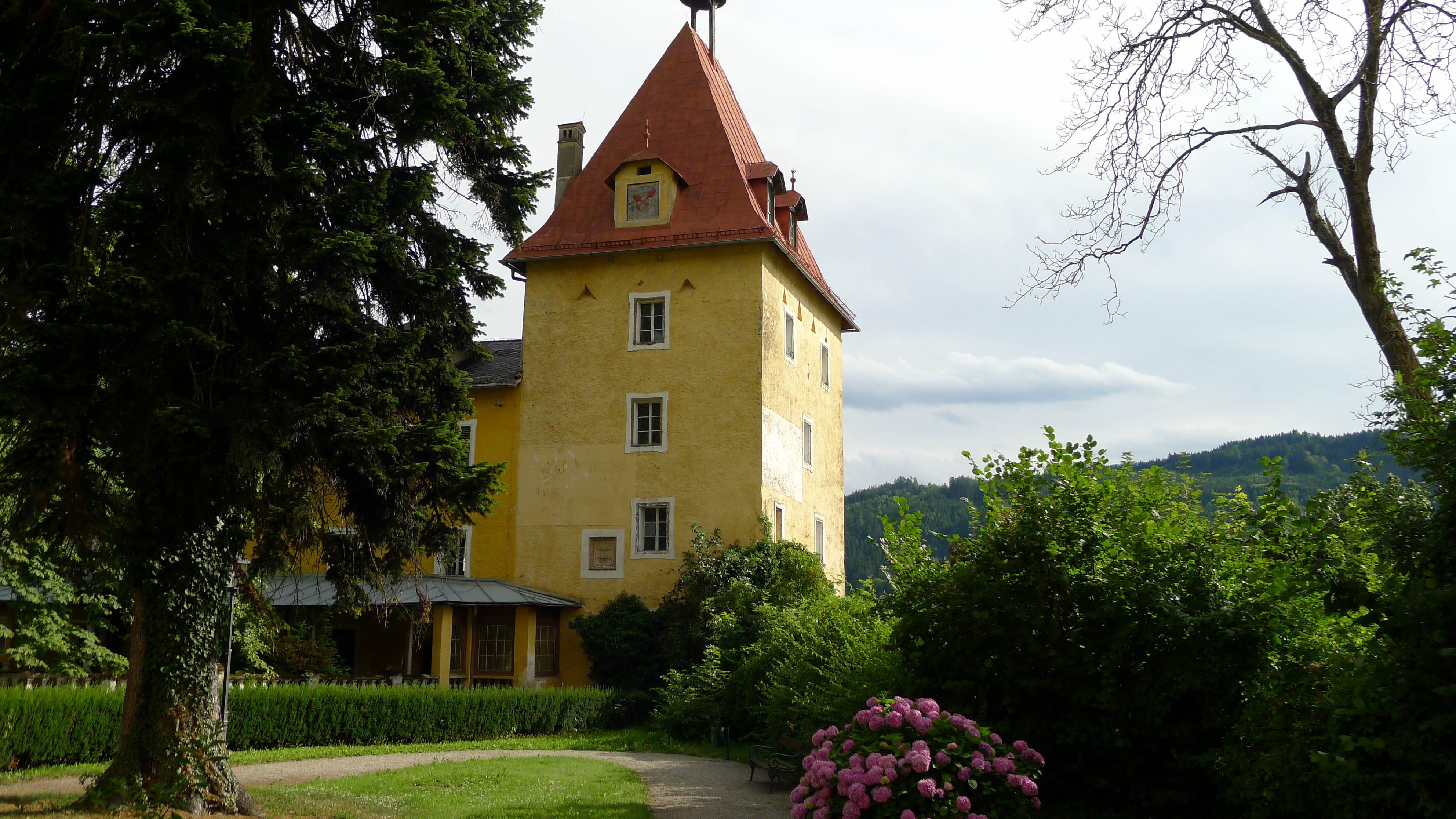 Ehem. Benediktinerstift Millstatt